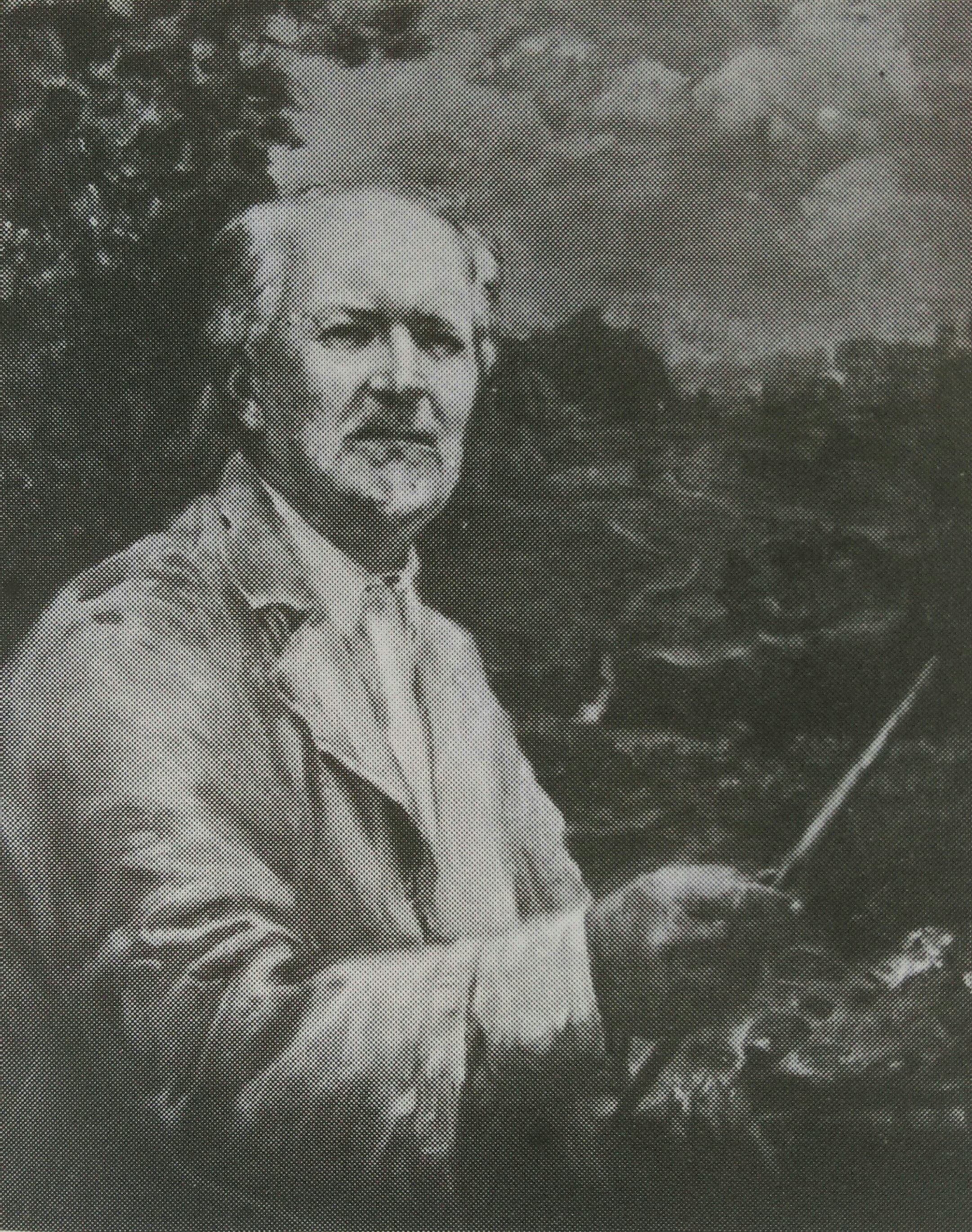 Фёдор Модоров. Портрет Витольда Бялыницкого-Бирули, 1950 год. 79,3 х 61,8 см. Национальный художественный музей Беларуси.